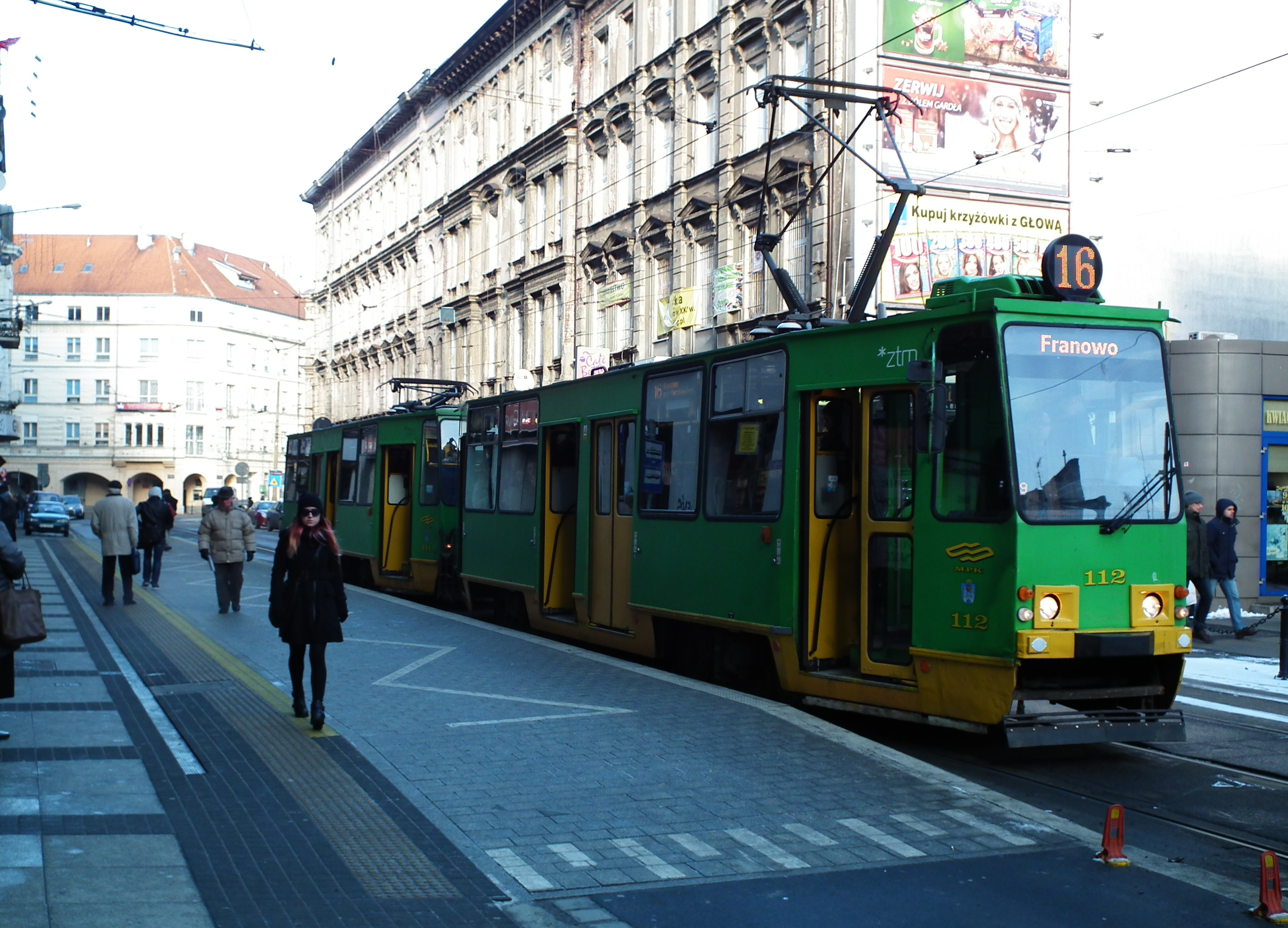 Przystanek wiedeński na ul. Gwarnej w Poznaniu.